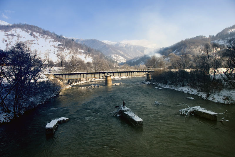 Der Fluss Vişeu in Bistra, Maramureş